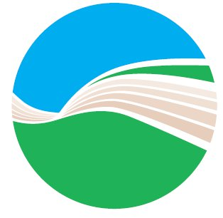 Logo del Parco regionale della vena del gesso Romagnola